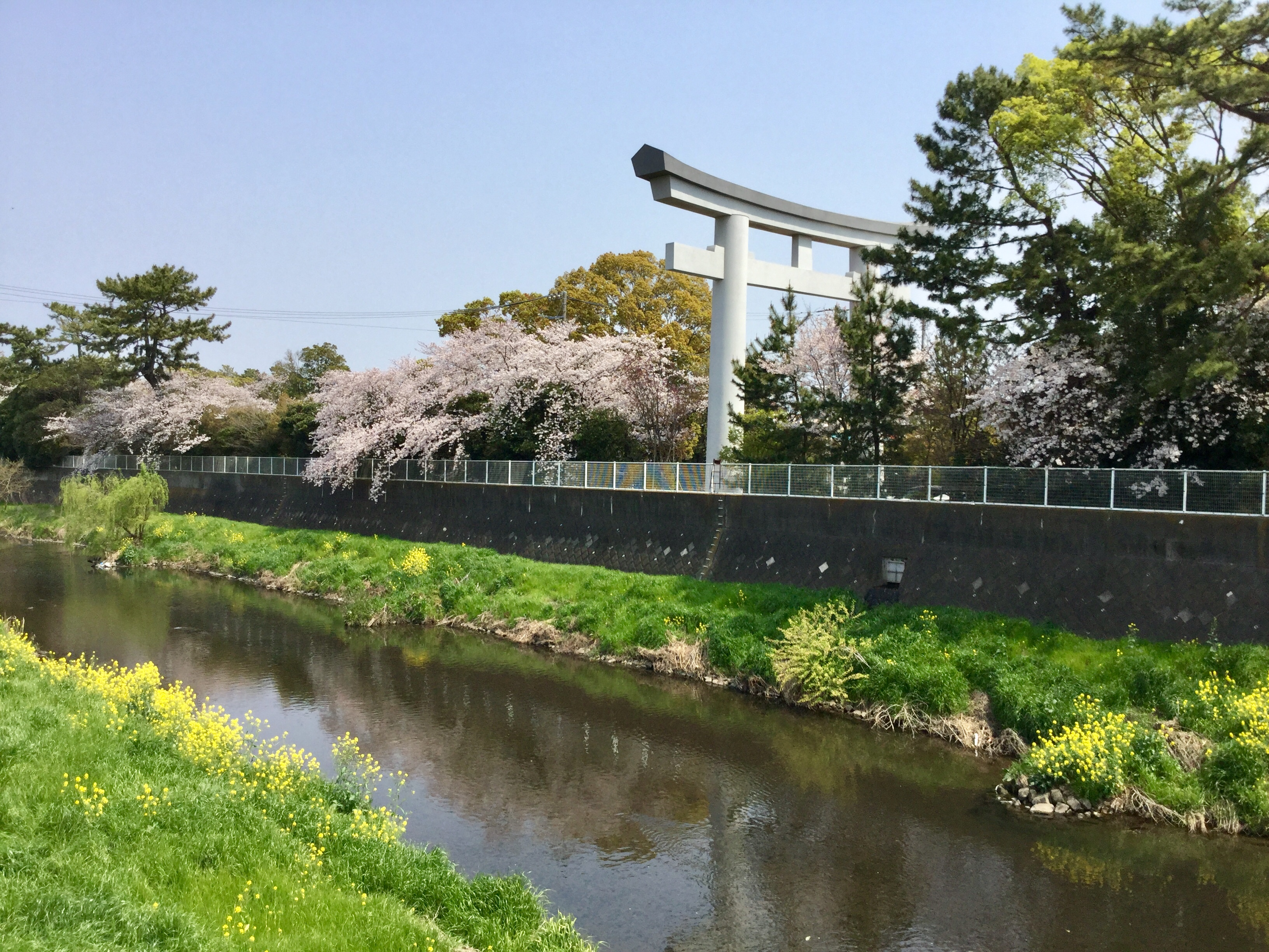 目久尻川と寒川神社表参道